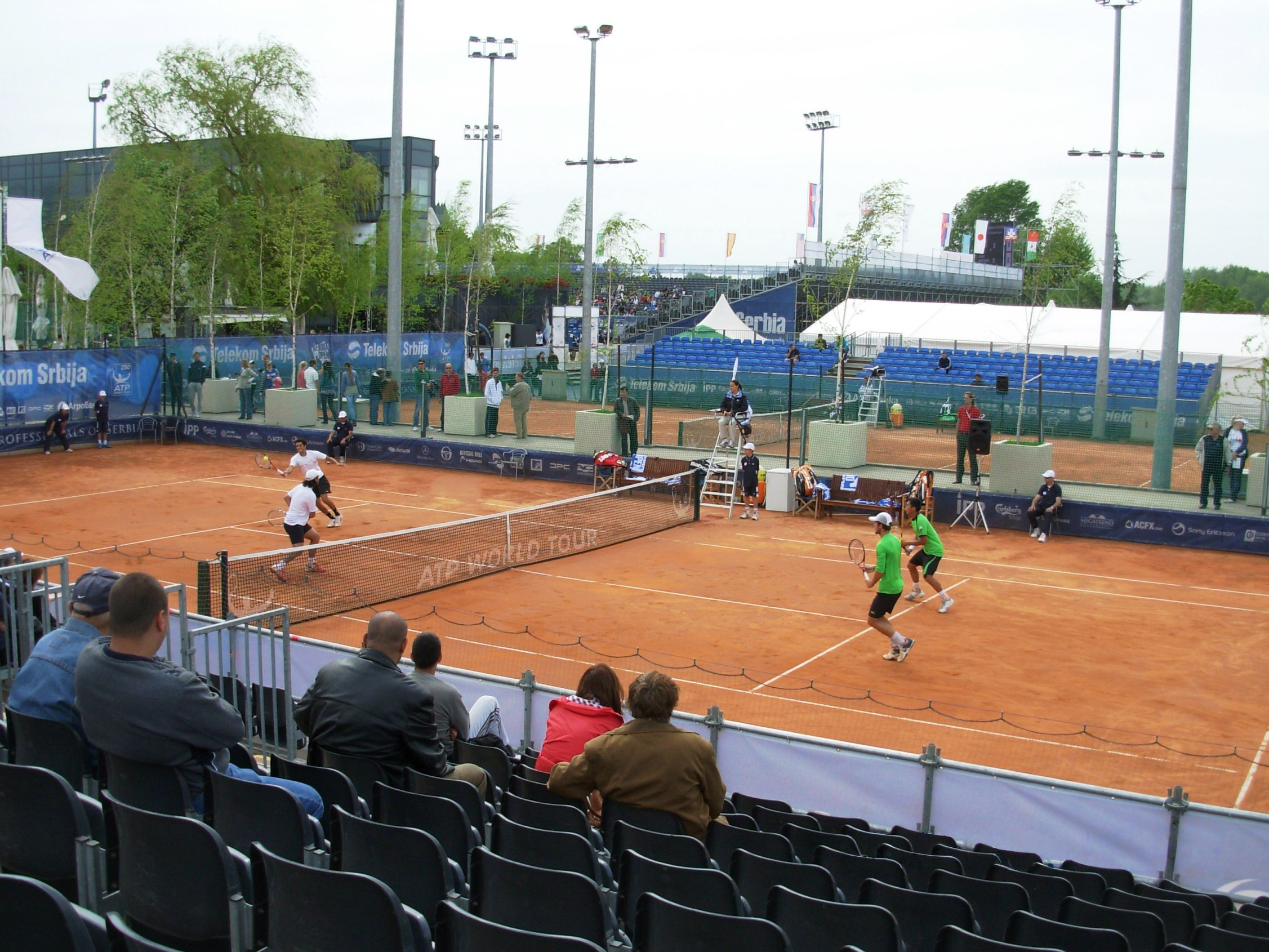 Serbia Open dubl na pomoćnom terenu, "25 Maj", Beograd. Snimio Goldfinger